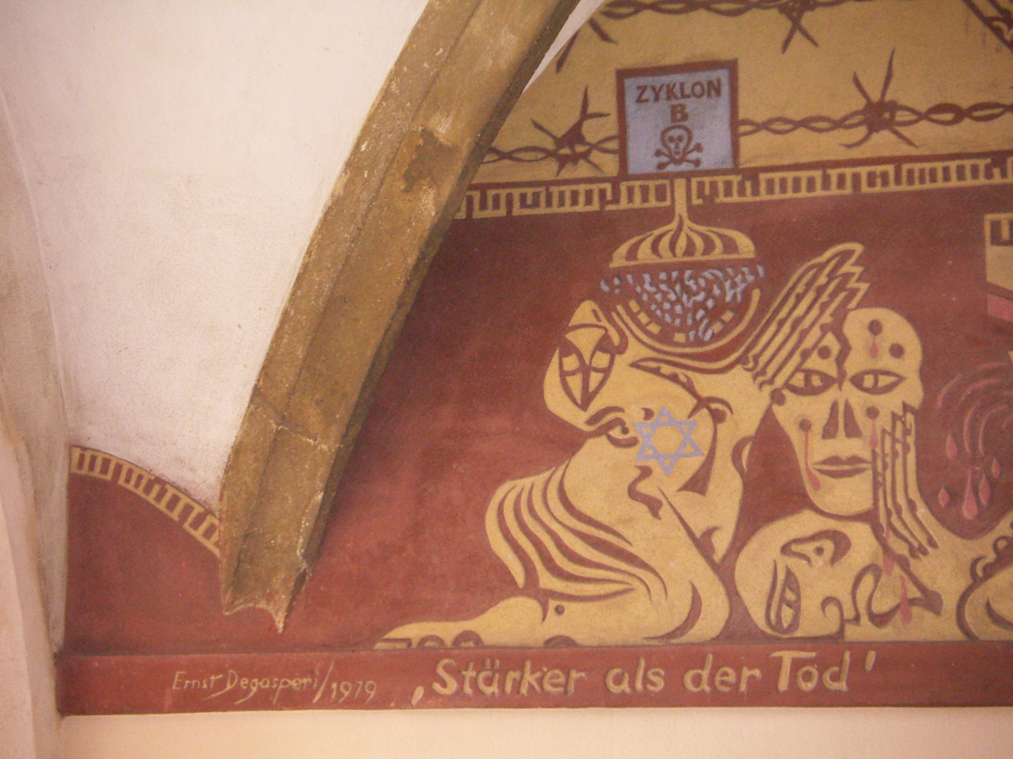 Sgraffiti-Werk von Ernst Degasperi beim Tor des Friedens im offenen Eingangsbereich der Pfarrkirche St. Stephanus in Eggenburg in Niederösterreich, Jahr 1979, Thema: Stärker als der Tod